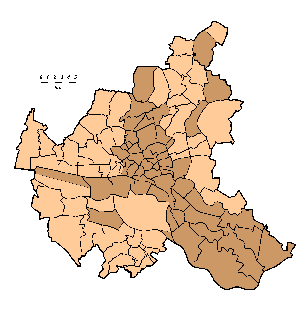 Groß-Hamburg-Gesetz: Die Grafik zeigt die Freie und Hansestadt Hamburg in ihren Grenzen bis 1937 und die eingemeindeten Gebiete. Sonstige Gebietsveränderungen als Folge des Groß-Hamburg-Gesetzes, insbesondere für die Bereiche Geesthacht, Cuxhaven, Großhansdorf oder Lübeck, bleiben auf der Grafik unberücksichtigt. Es bestehen mit Blick auf die heutigen Stadtteil- und Bezirksgrenzen mitunter unbedeutende Abweichungen, da es im Rahmen des Groß-Hamburg-Gesetzes zu einigen geringfügigen Grenzverschiebungen und Gebietsbereinigungen kam (beispielsweise Altona/St. Pauli – Bramfeld/Ohlsdorf – Wohldorf/Duvenstedt und Lemsahl – Stadt Harburg/Marmstorf) und in der Folgezeit bis in die jüngere Vergangenheit hinein durch Umstrukturierungen neue Stadtteile entstanden (beispielsweise Sternschanze).